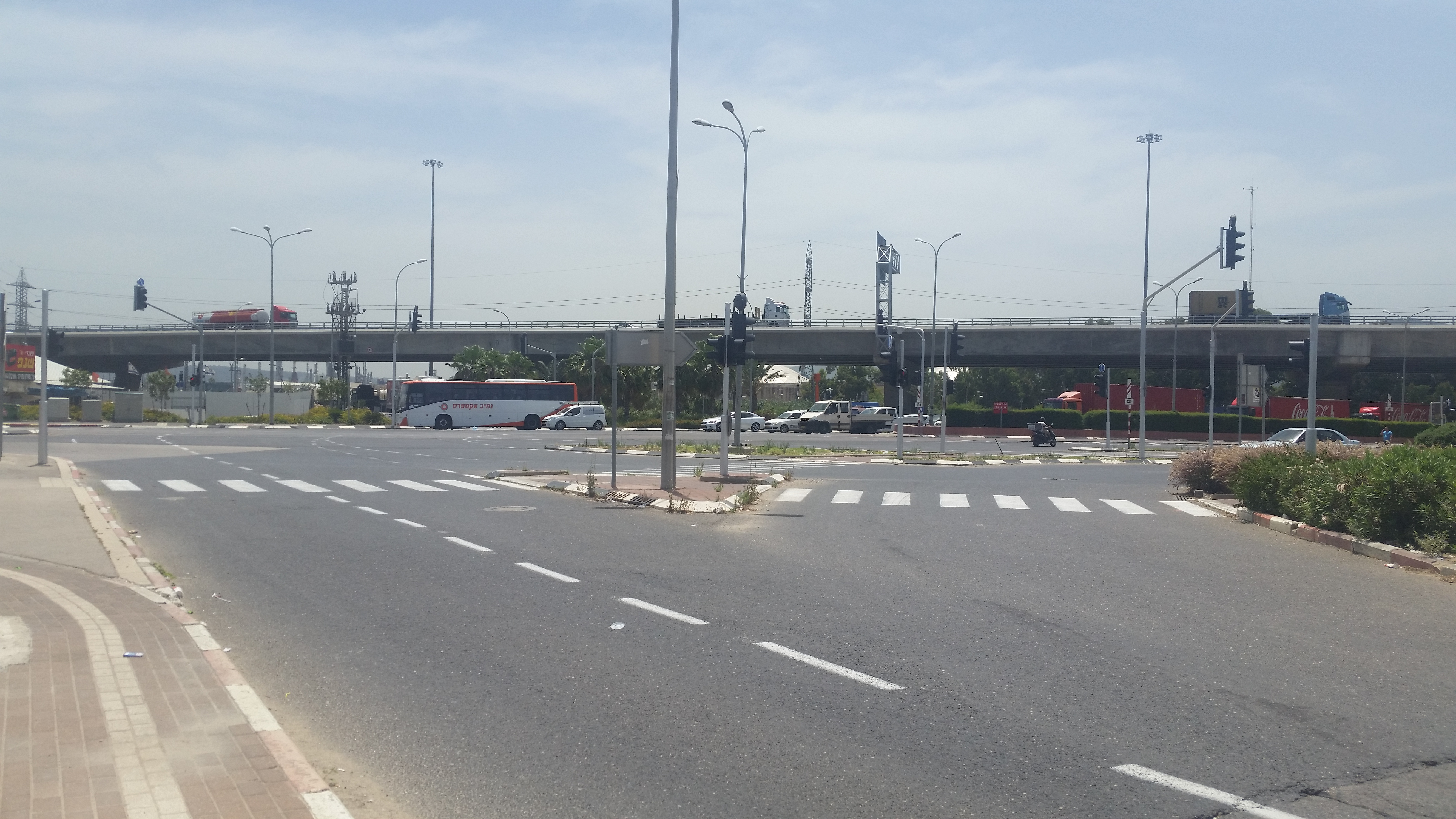 צומת וולקן על כביש 4 ליד חוצות המפרץ מדרומו נמצא מחלף ההסתדרות המשמש לעלייה וירידה מכביש 22 לכביש 4